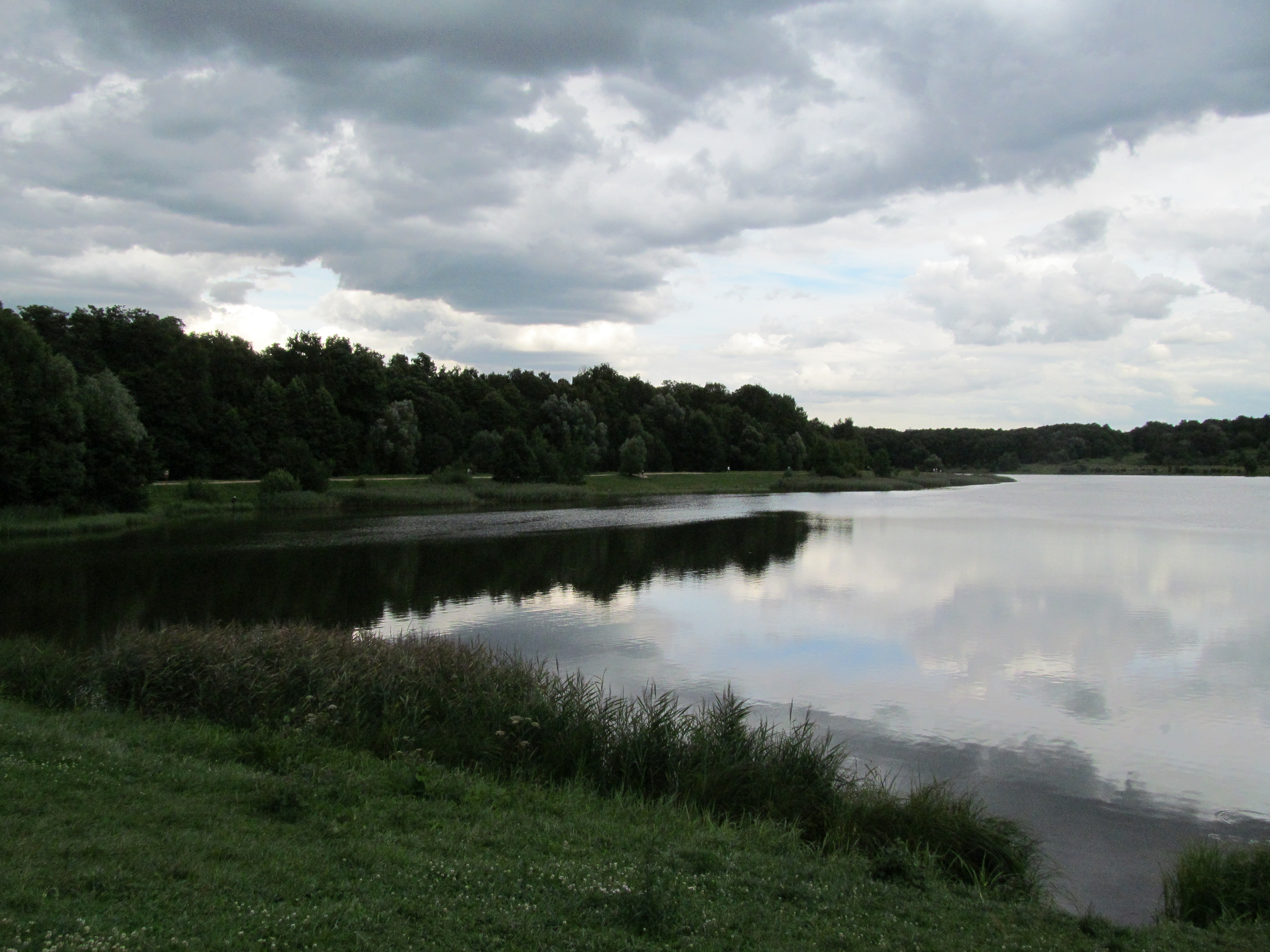 Лебедянский пруд в Москве